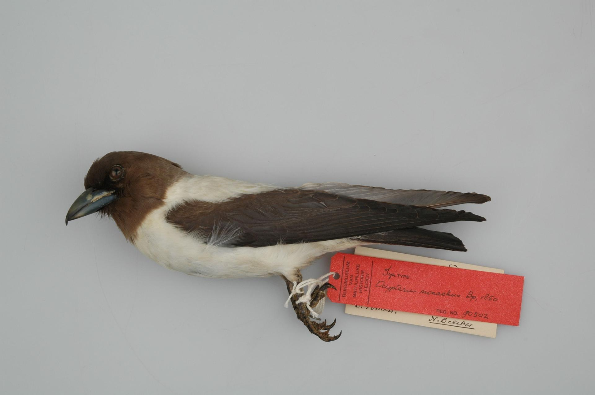 Artamus monachus Bonaparte, 1850